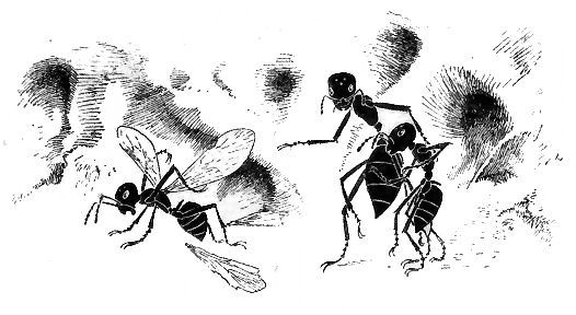 Karl Elleders Illustration in "Max Butziwackel der Ameisenkaiser"